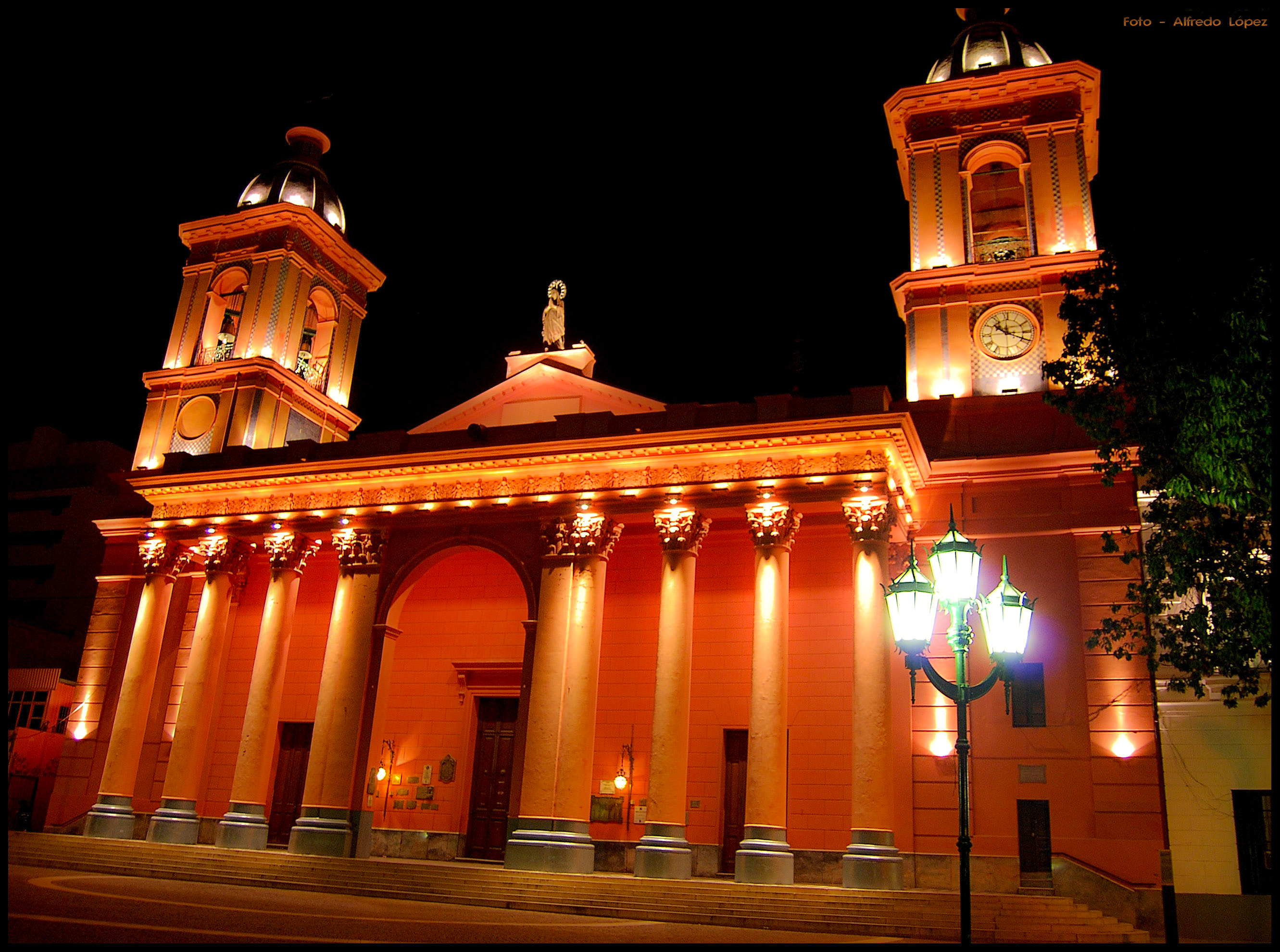 Este templo es uno de los más importantes en su tipo que existe en la Argentina. La fachada, con su imponente atrio que avanza hacia la vereda ( ahora reemplazada, al igual que la calzada, por el Paseo de la Fe ) construido en 1995, en adhesión a las 300 años del traslado de la Sagrada imagen hasta su actual templo, por la Municipalidad de San Fernando del Valle de Catamarca) está enmarcando entre dos altas torres en sus extremos laterales, que culminan con un reducido frontis triangular, lo que da solemne grandiosidad al edificio sacro. El templo tiene una nave principal y dos laterales y cuenta con varias capillas intercomunicadas ( tres en el costado sur y cuatro en el norte). Los pisos fueron construidos con sólidos tablones de algarrobo, hoy de mosaico marmóreos con decoraciones geométricas. En 1869, la iglesia tenía tan sólo tres naves, pero surgieron dudas cerca de la solidez de la estructura. Por ello, la iniciativa del Vicario Segura y por consejo de técnicos, se levantaron las capillas laterales y los arbotantes volantes de los costados. Las dimensiones monumentales de la nave central reflejan la grandiosidad de la Basílica. Mide 58,50 m de largo, 9,65 m de ancho y 14,65 m de alto. El Altar Mayor fue realizado en mármol blanco de Carrara hacia 1875. Es una obra de rica ornamentación e incluye en su parte superior el trono de la Virgen del Valle. La Cúpula culmina a 42 m de altura. En su cúspide, se colocó, el 28 de marzo de 1869 y frente a una gran cincurrencia, una cruz de hierro enviada por el Dr. Filemón Posse desde Córdoba